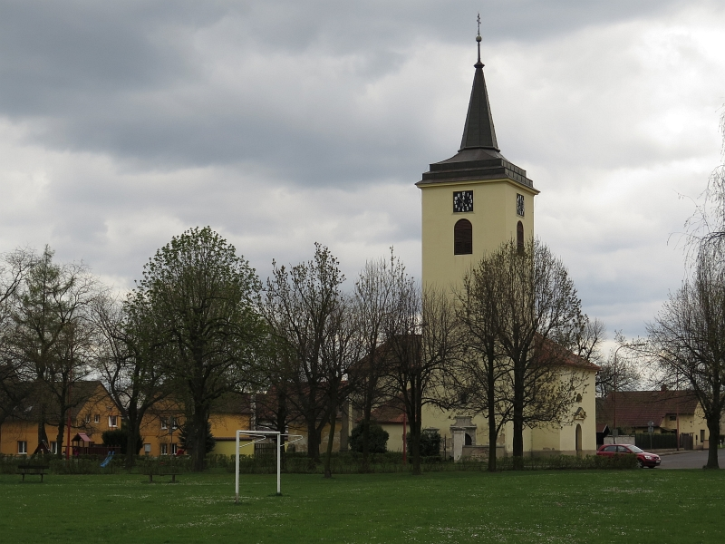 Kostel svatého Jana Nepomuckého, Slatina (okres Litoměřice).